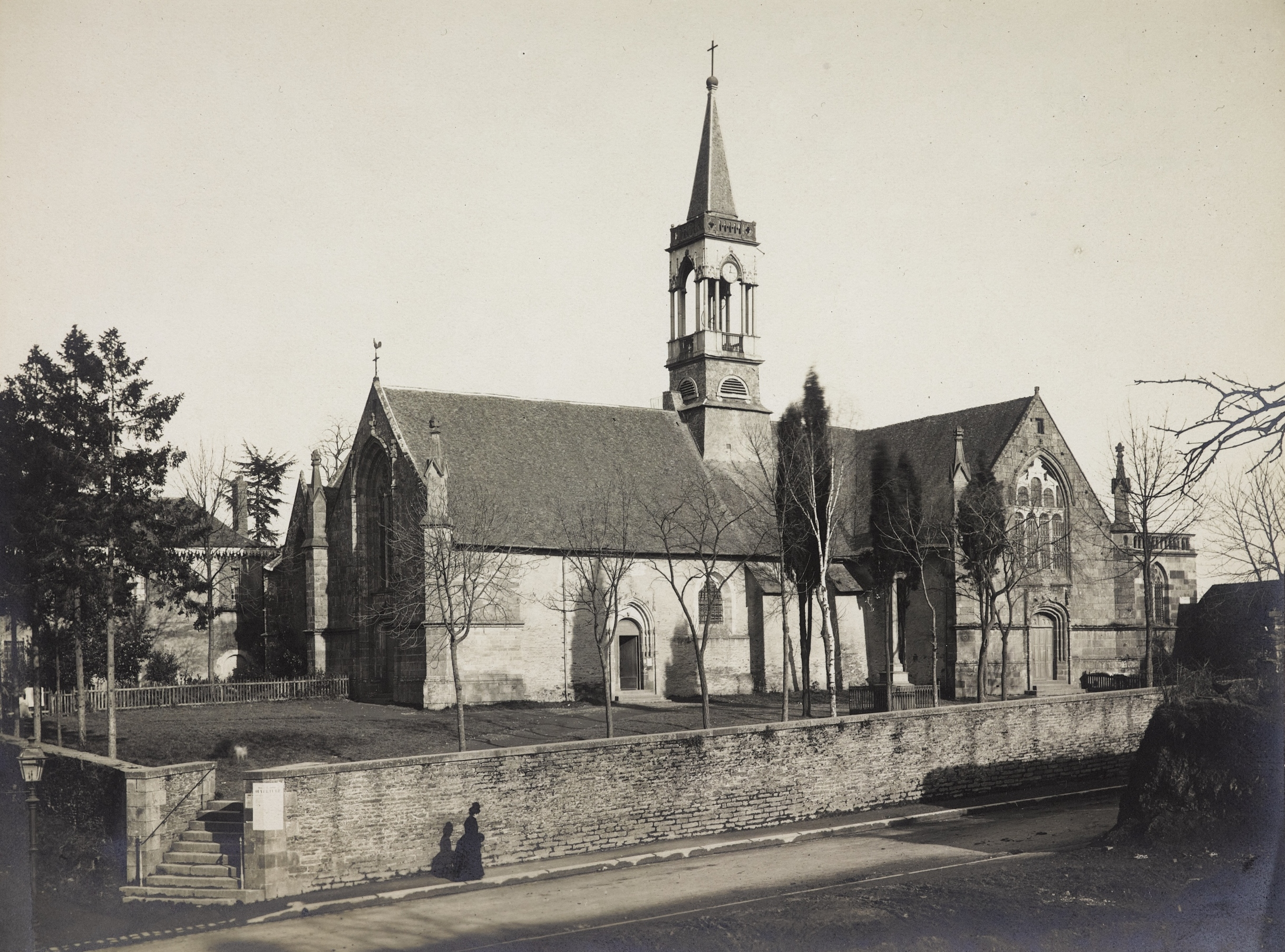 Vue sur l'église Saint-Hélier et son ancien clocher, prise du sud-ouest. La photographie montre, au premier plan, une passante dans la rue Saint-Hélier. La paroisse Saint-Hélier existe depuis le IXe siècle, mais la majeure partie de l'édifice date des XVe et XVIe siècles. L'église était initialement composée d'un chœur, d'une nef, d'un transept et d'un seul bas-côté au nord. Le collatéral sud fut ajouté par l'architecte Arthur Regnault en 1929. Le clocher visible sur cette photographie fut détruit en 1892.